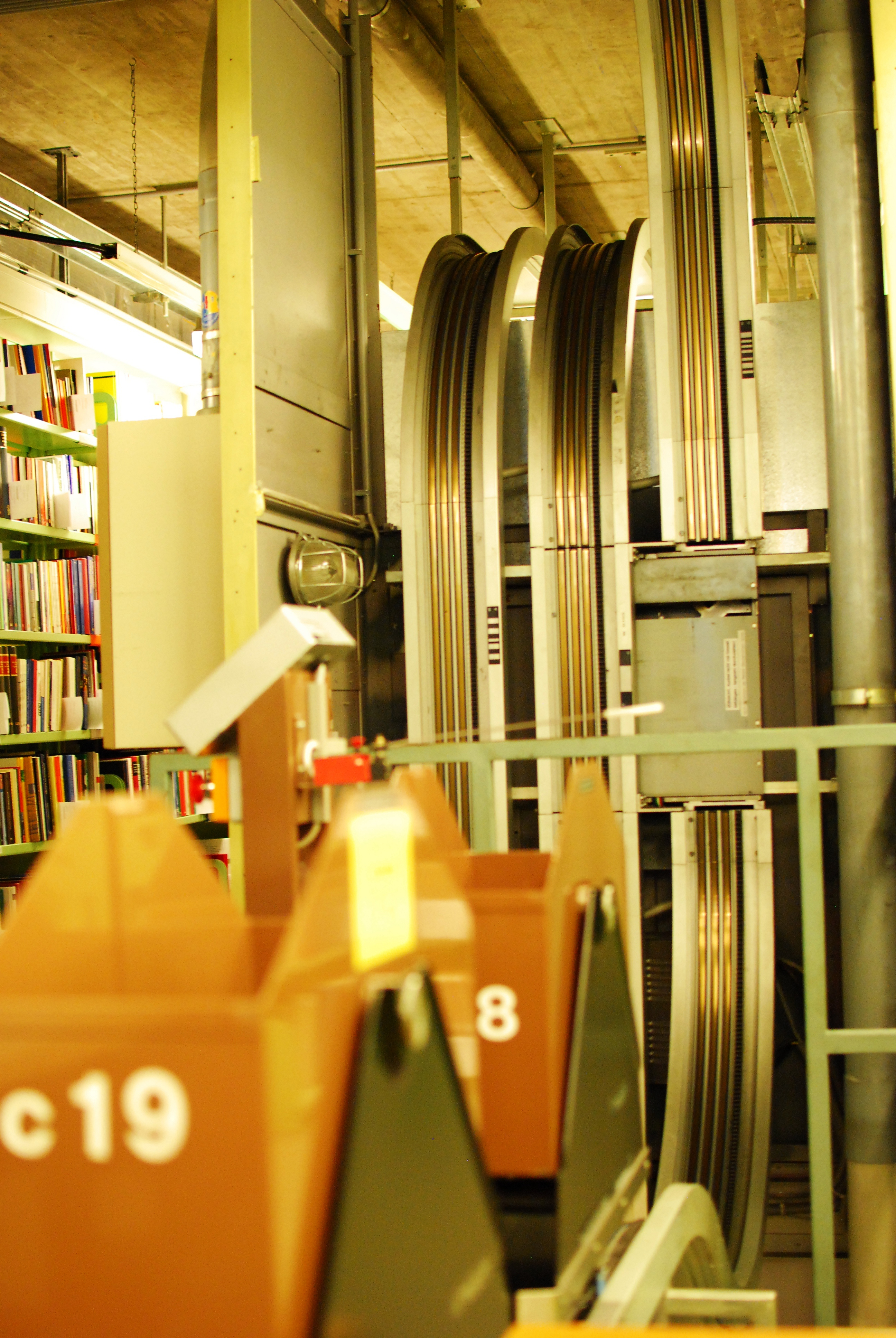 Telelift Buchtransportanlage im Tiefspeicher der Universitätsbibliothek Salzburg, Österreich.